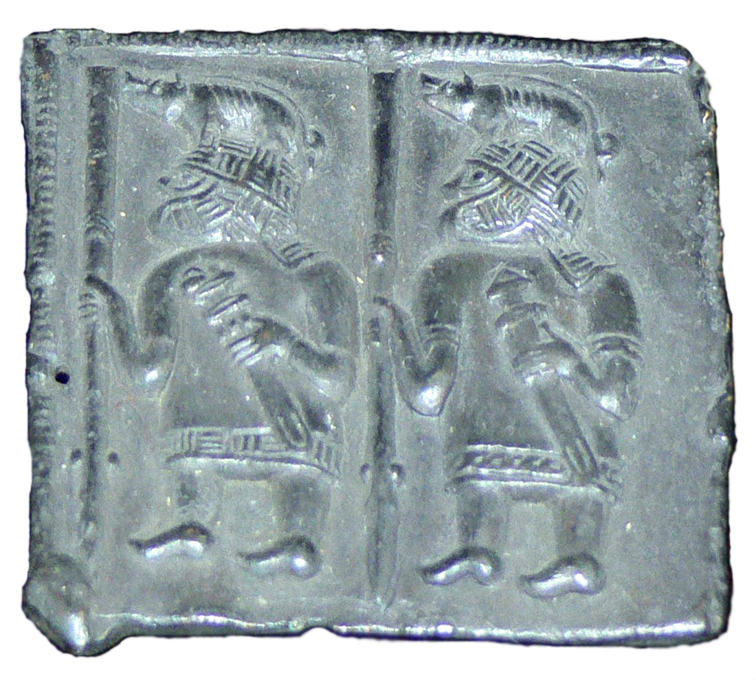 Vier Model aus Björnhovda im Kirchspiel Torslunda auf Öland (Schweden). 2. Hälfte des 6. Jh. Replik im Römisch-Germanischen Museum in Mainz. (Original im Staatlichen Historischen Museum Stockholm).